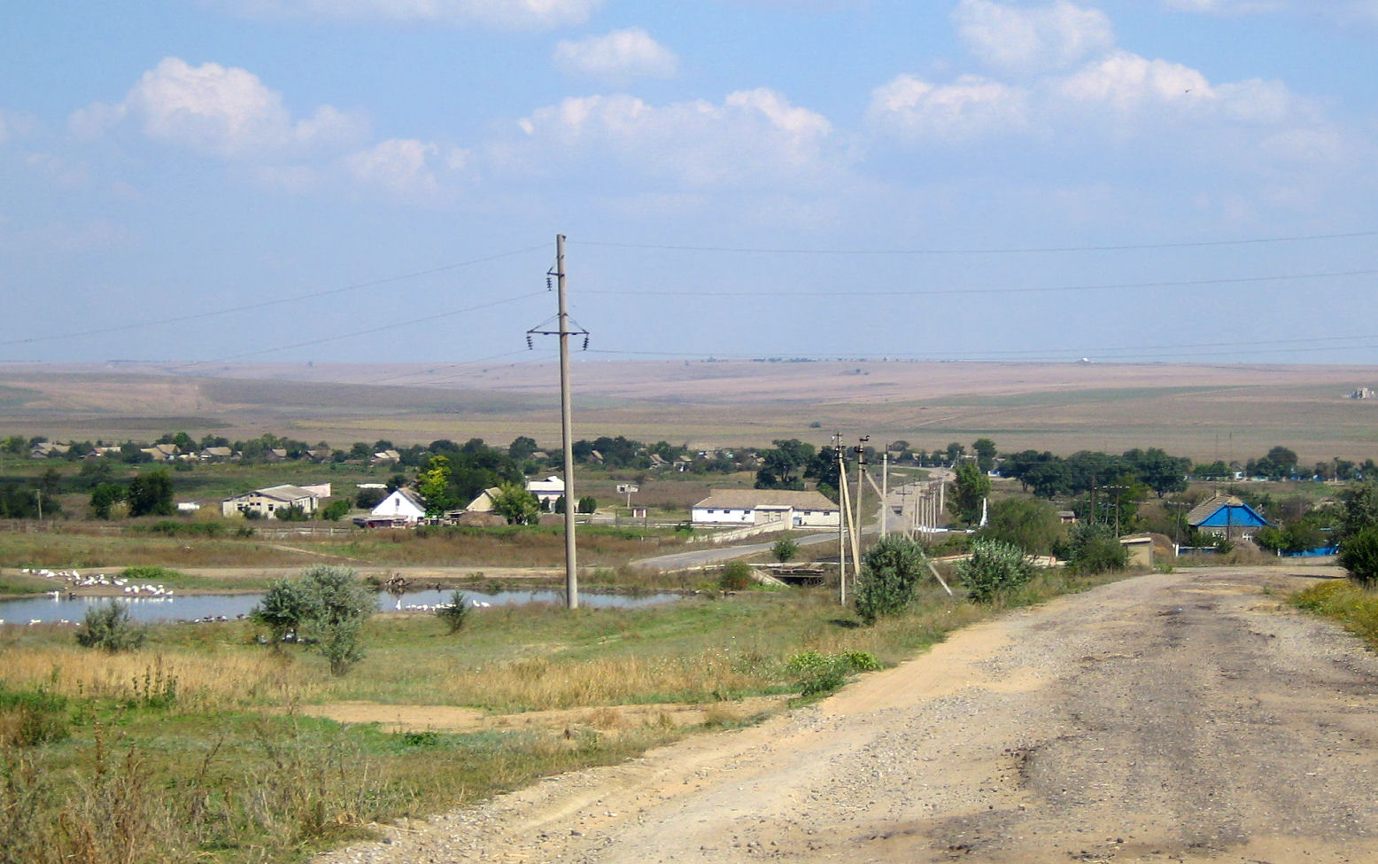 Wessela Dolyna (Tarutyne)